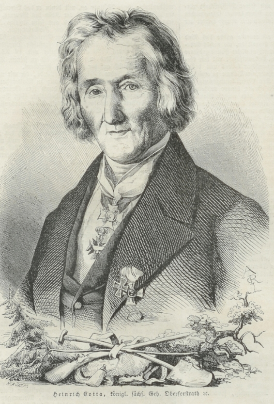 Johann Heinrich Cotta (1763-1844), German forestry scientist / Deutscher Forstwissenschaftler